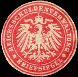 Sealing stamp Title: Briefsiegel - Reichsschuldenverwaltung Description: rot, weiß, geprägt Place: size: 3 cm